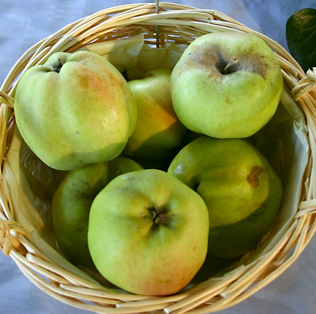 Malus "Weißer Winterkalvill", Büdingen